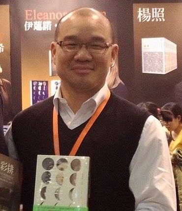 2015台北國際書展，聯經出版總編輯胡金倫。